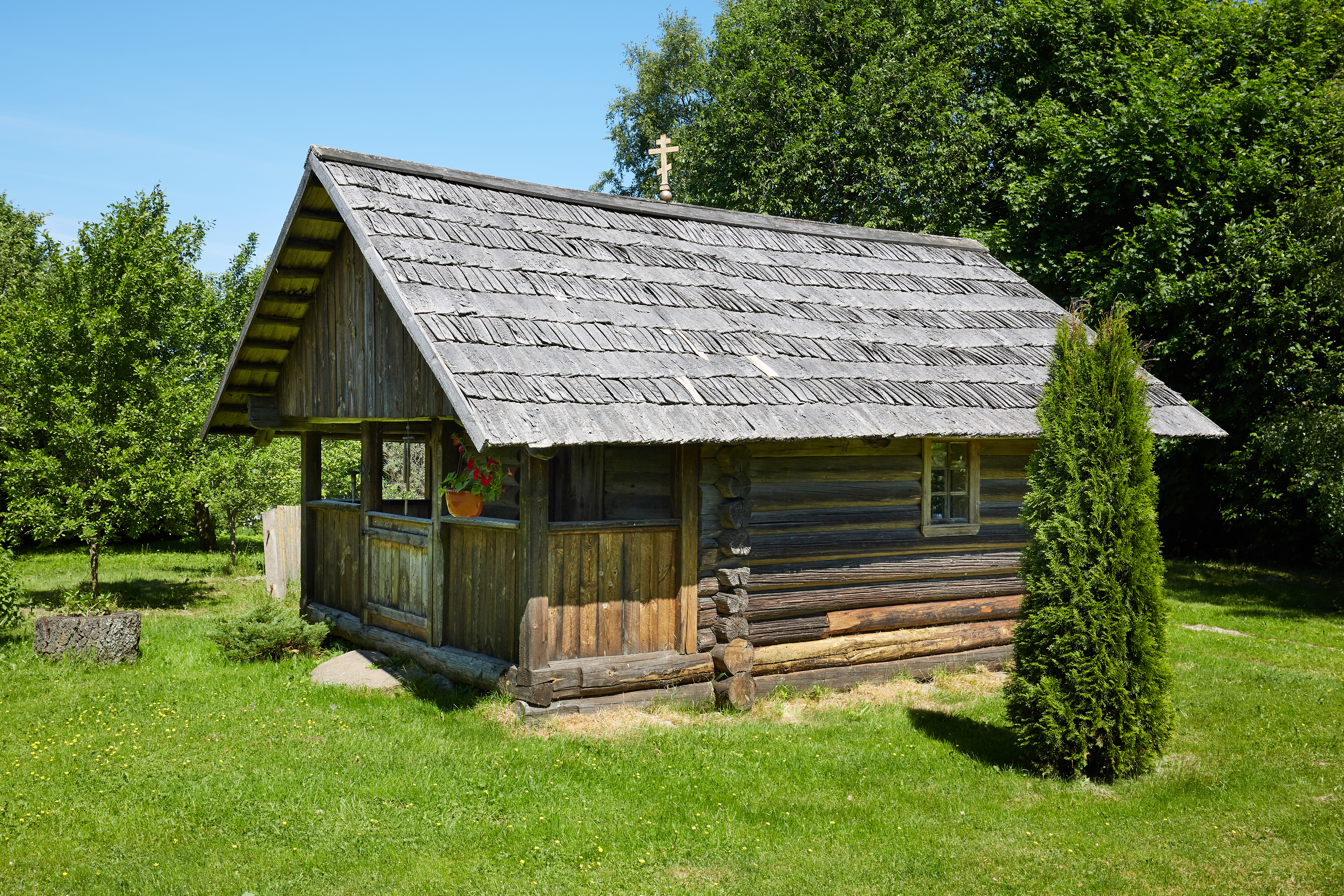 Serga küla tsässon 2018. aastal